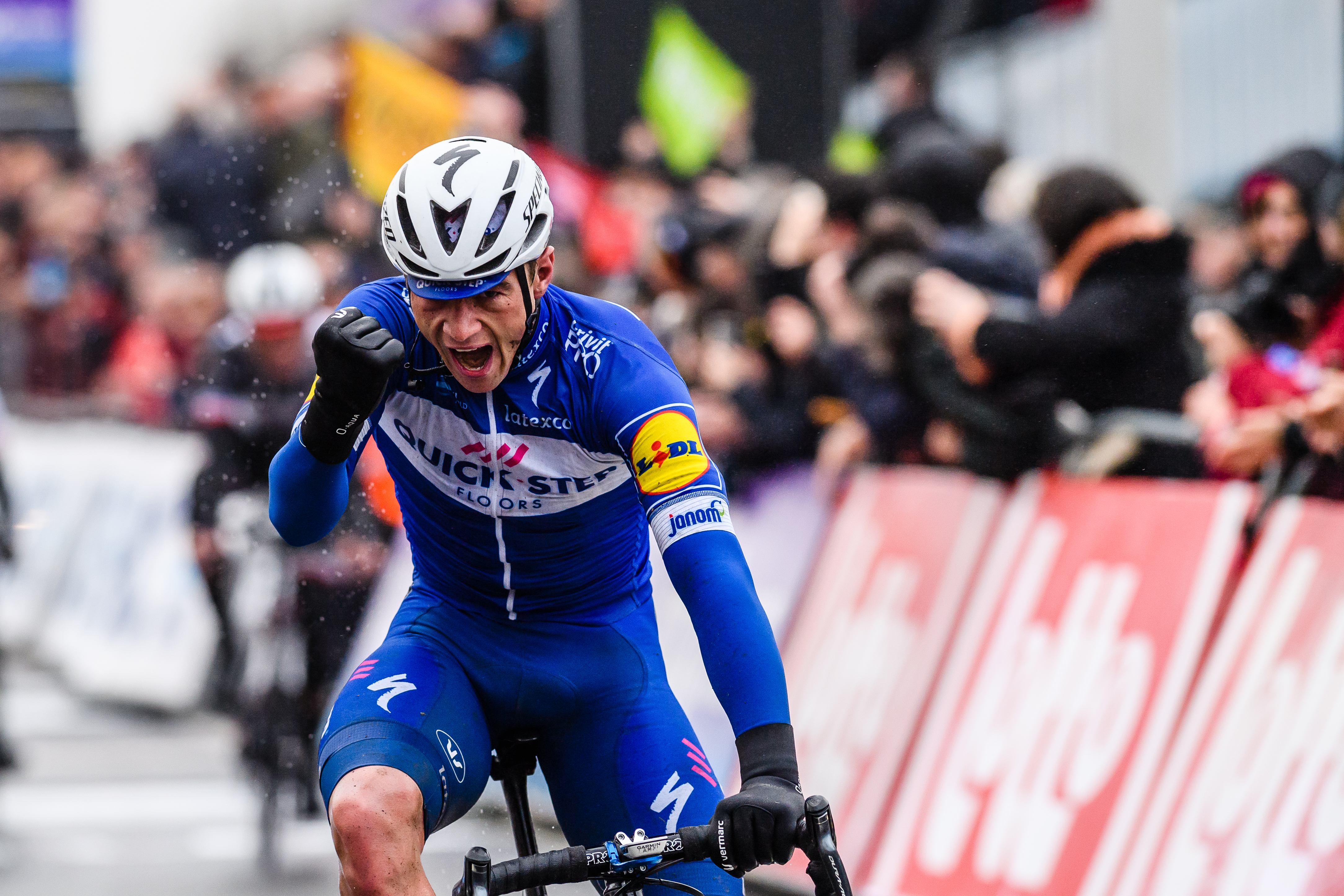 In 2018 wint Lampaert - ditmaal in bijzonder slechte weersomstanigheden - voor de tweede opeenvolgende keer in Dwars door Vlaanderen.